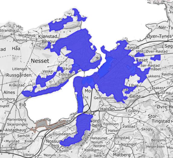 Bygger på kart fra Statistisk sentralbyrå